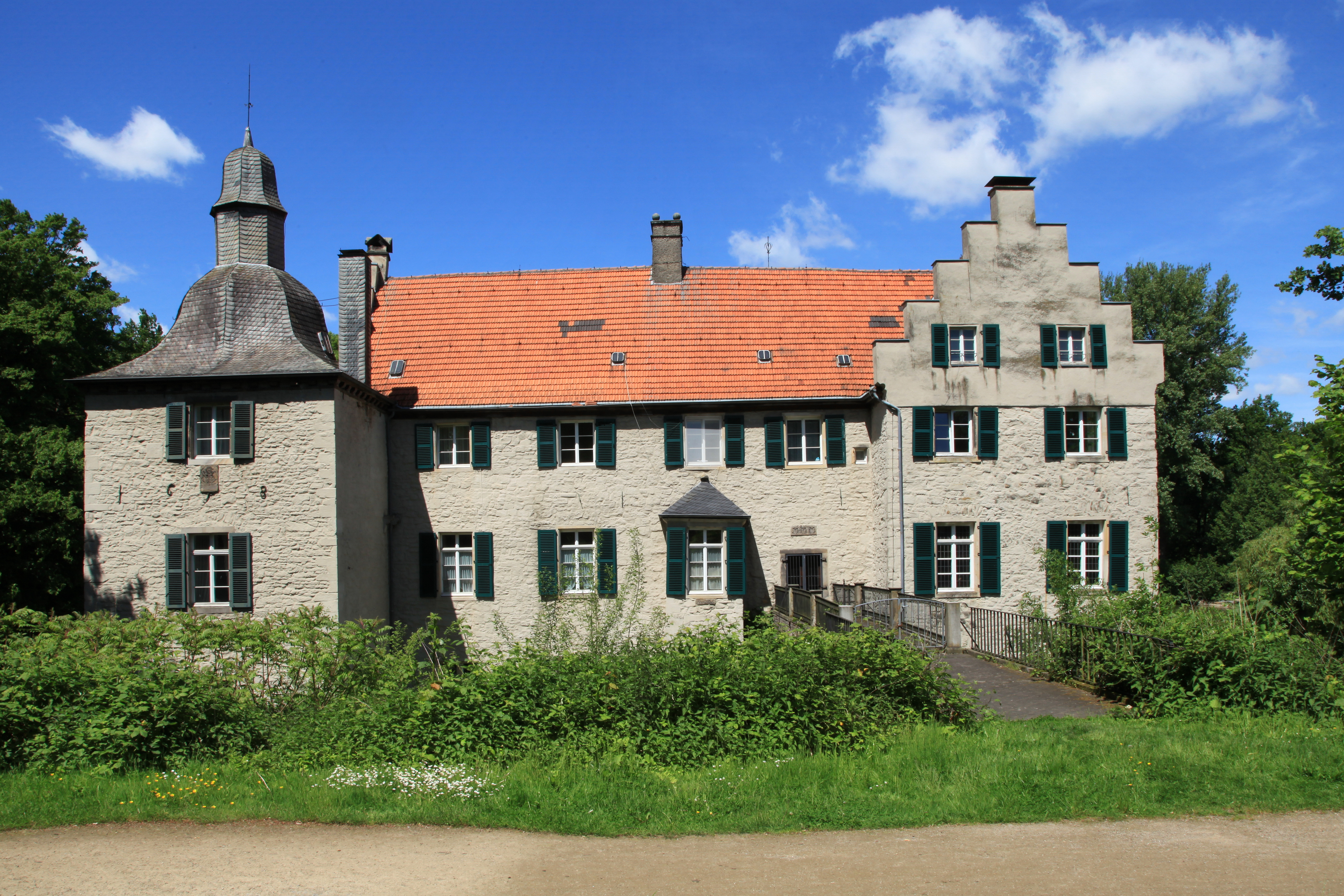 Wasserschloss Haus Dellwig, Mergelkopfweg/Dellwiger Straße in Dortmund